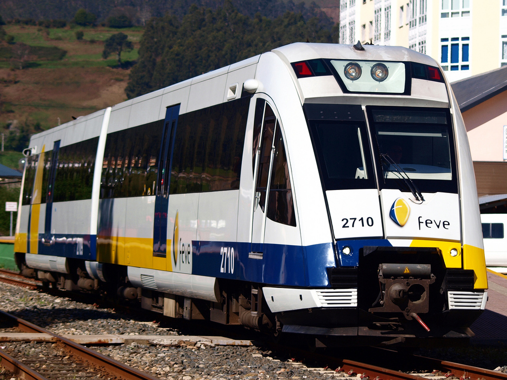 Fotografía publicada bajo licencia Creative Commons (CC) - Enrique Pernas. Foto tomada con Olympus E-450+ Zuiko 70-300.